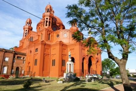 Santuario Nacional del Sagrado Corazón de Jesús en el barrio Cerrito de la Victoria de Montevideo.